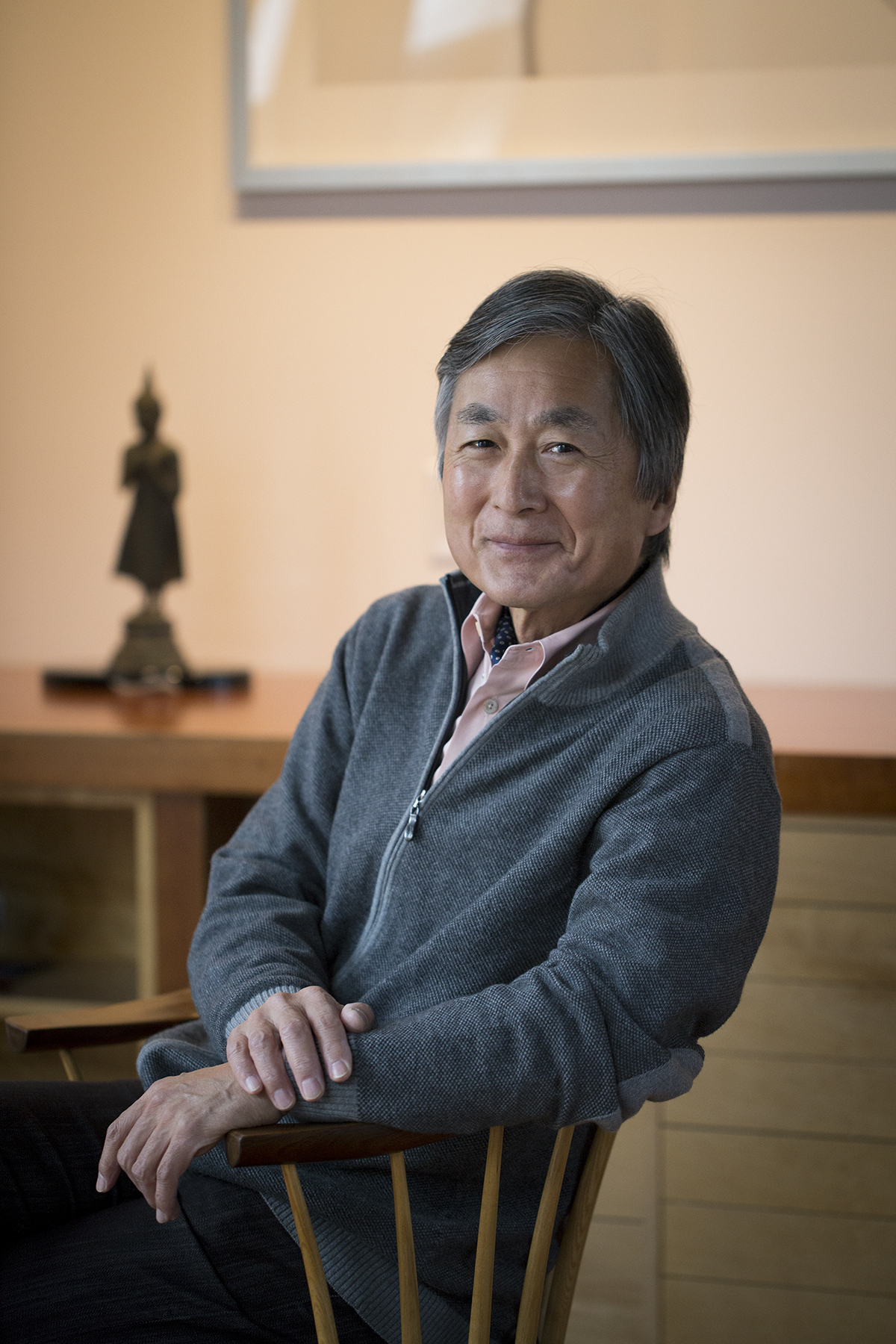 Kenro Izu (1949- ) Japanese fine art photographer